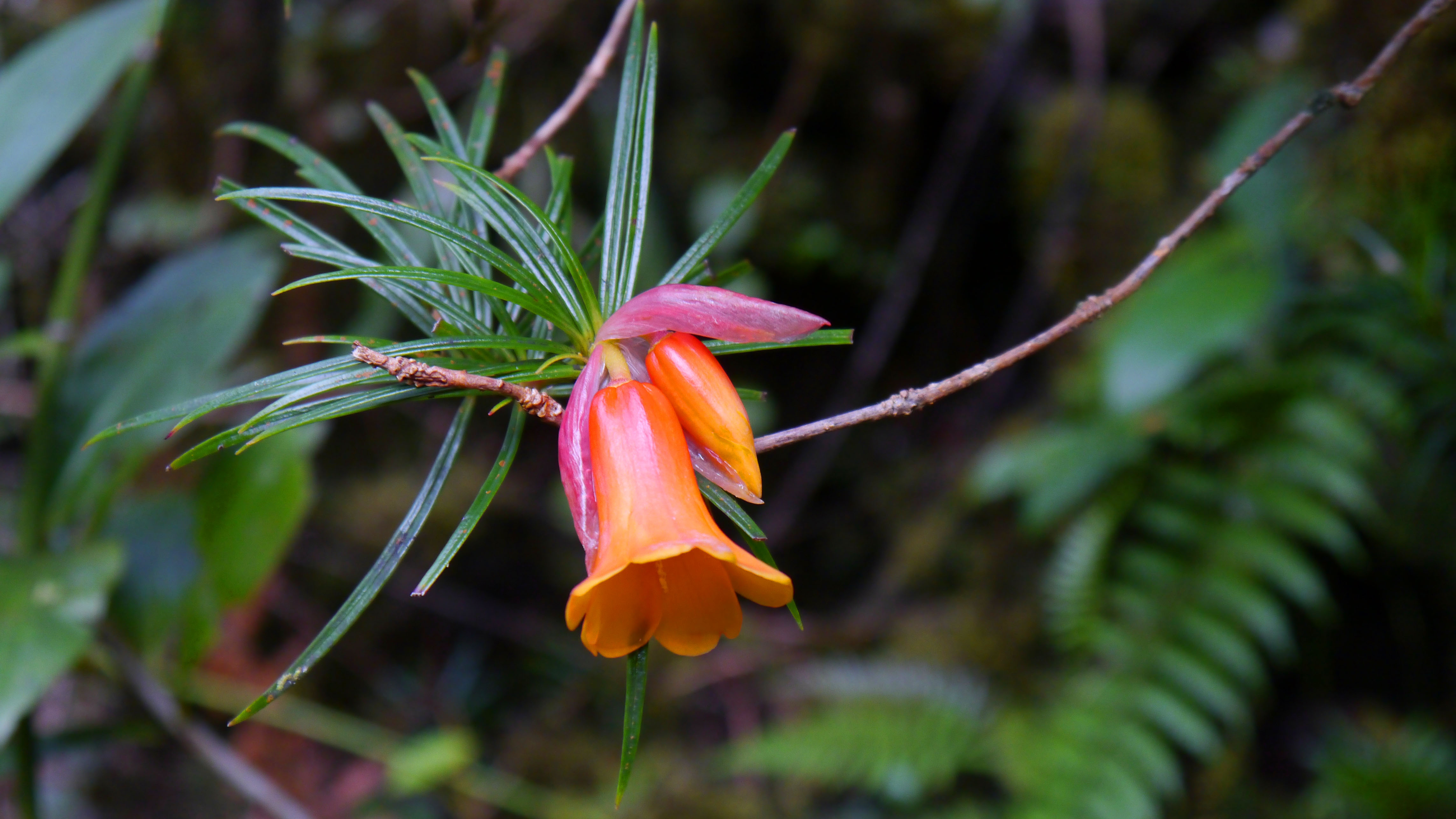 Rhododendron stenophyllum. Summit Trail, Mount Kinabalu National Park. Sabah, Malaysian Borneo.